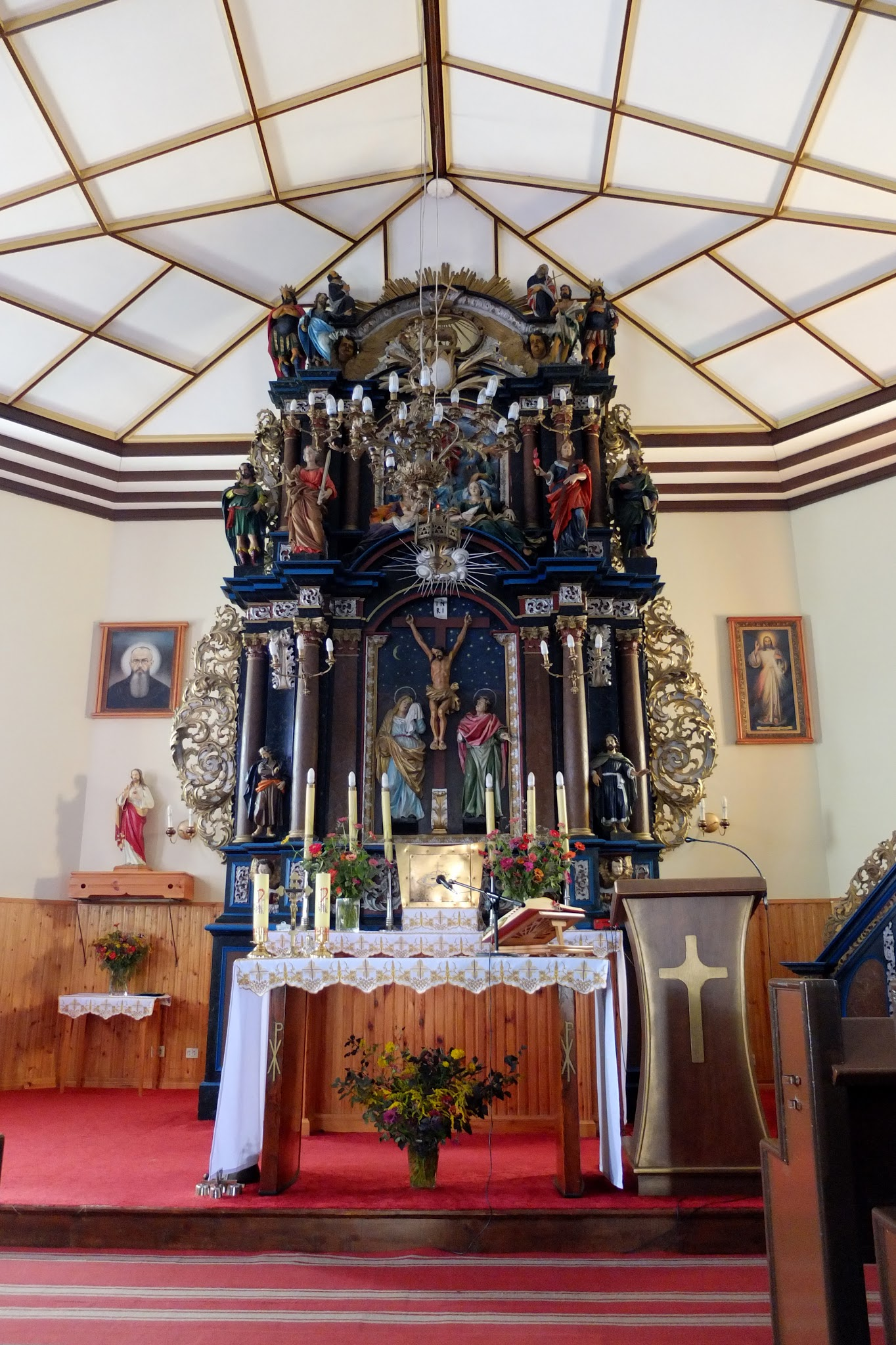 Księży Lasek - barokowy ołtarz (przeniesiony z kościoła w Rozogach)